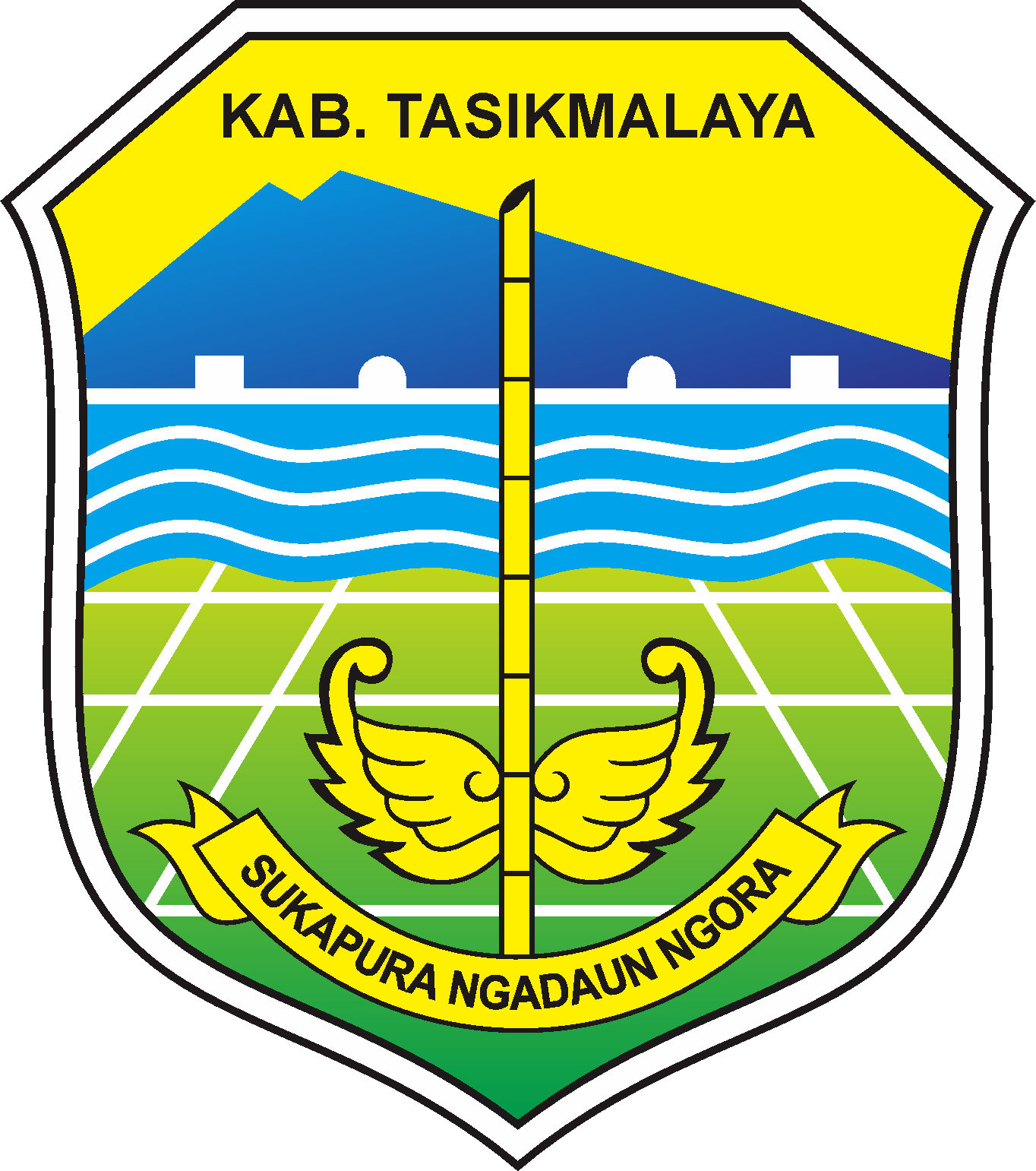 Seal of Tasikmalaya Regency